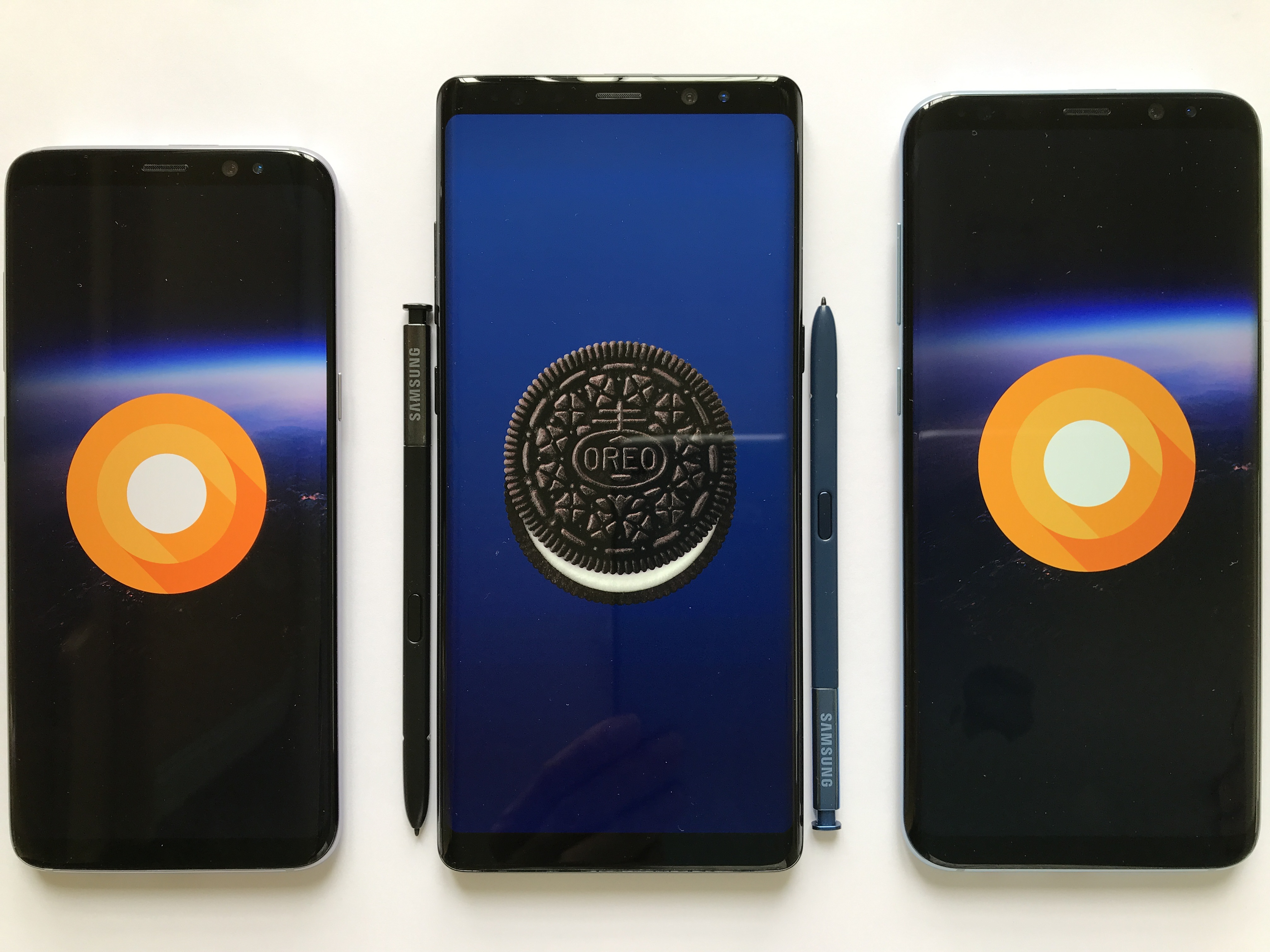 Android Easter eggs (Android Oreo)